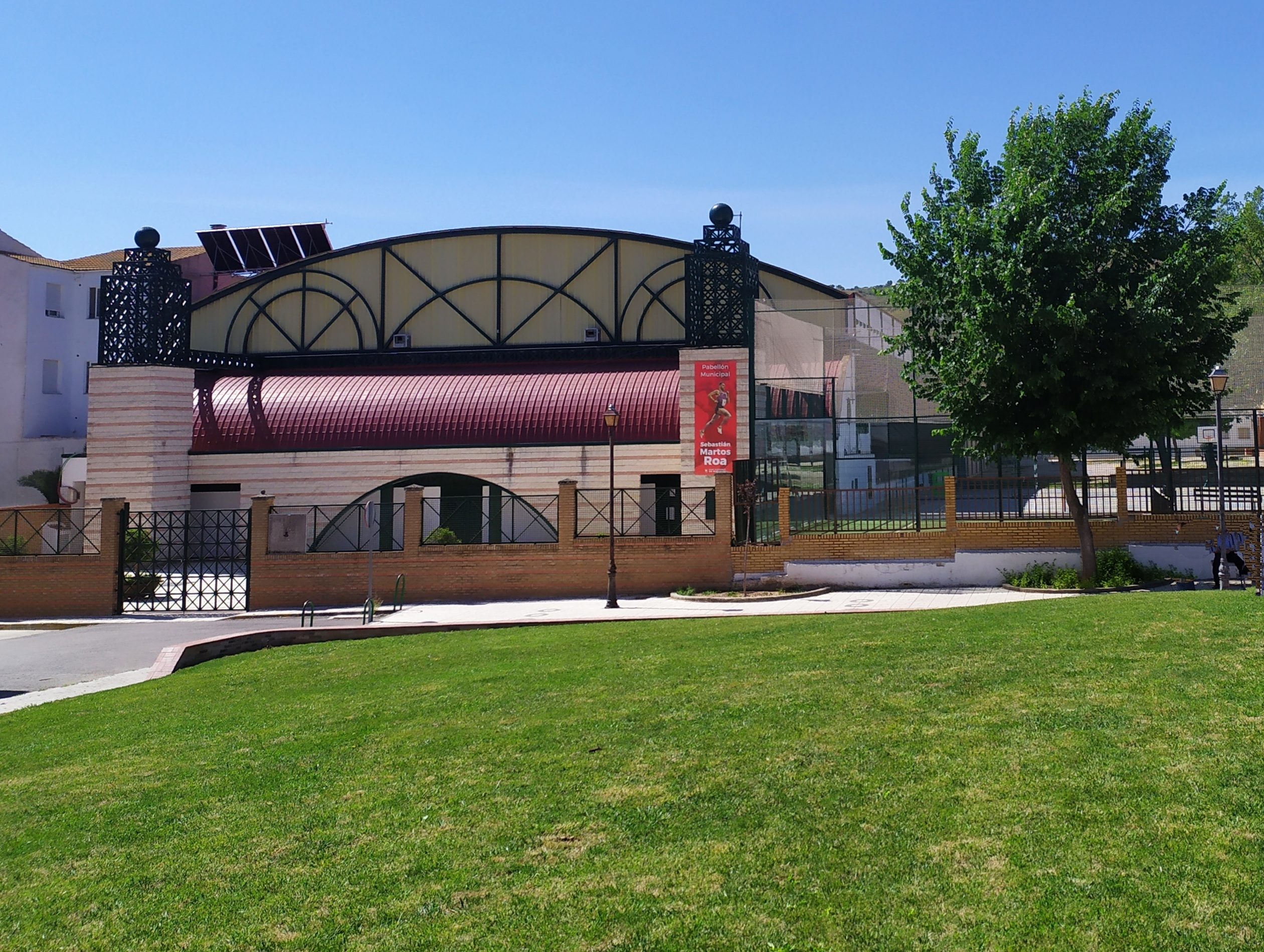 Pabellón polideportivo Sebastián Martos en Huelma, Jaén (Comarca de Sierra Mágina) donde se celebra además en agosto la ExpoMágina.